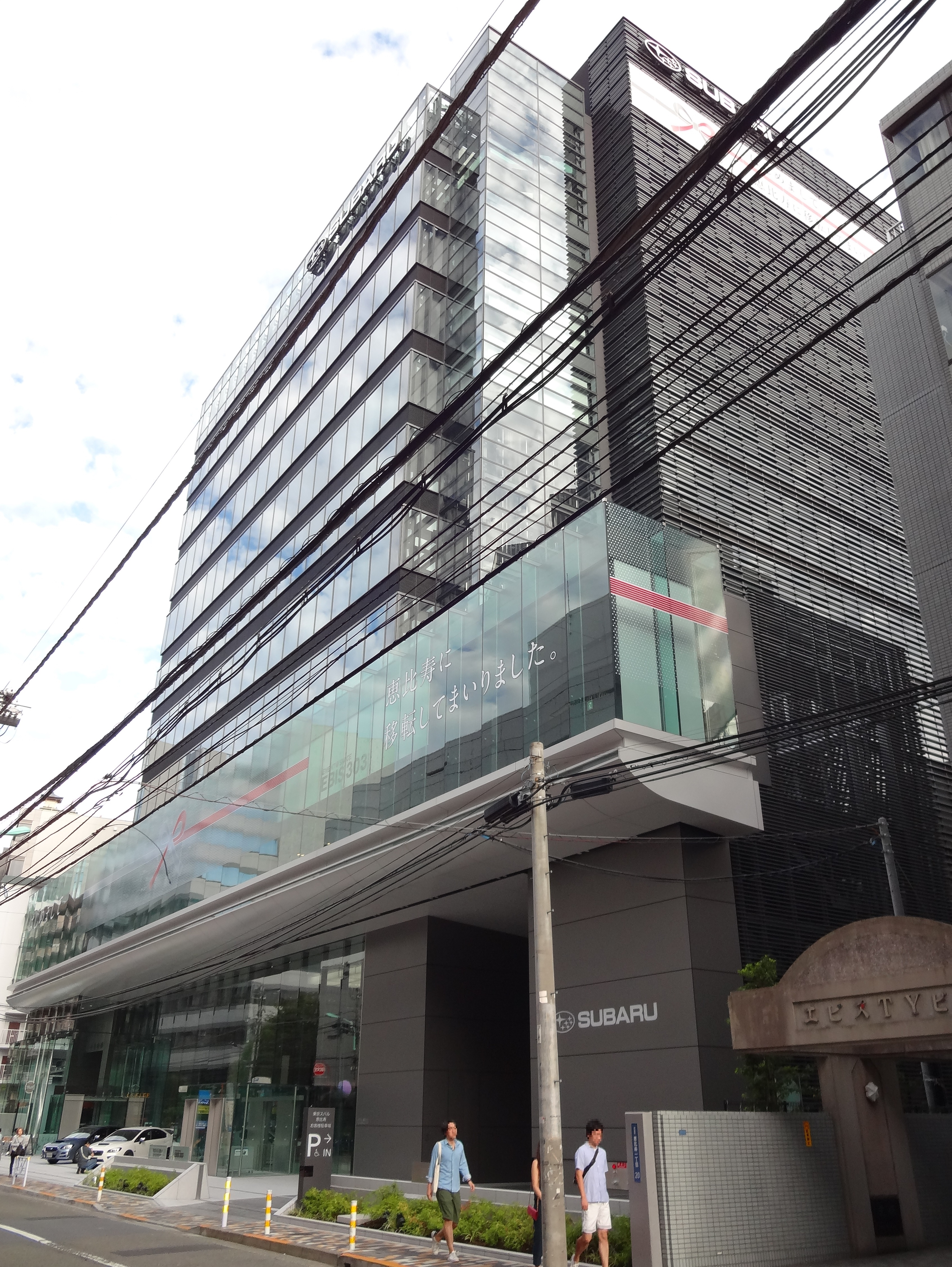 富士重工業本社ビルの外観。